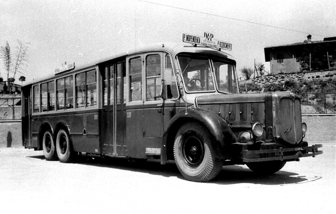 Autobus Alfa Romeo 110A di Roma